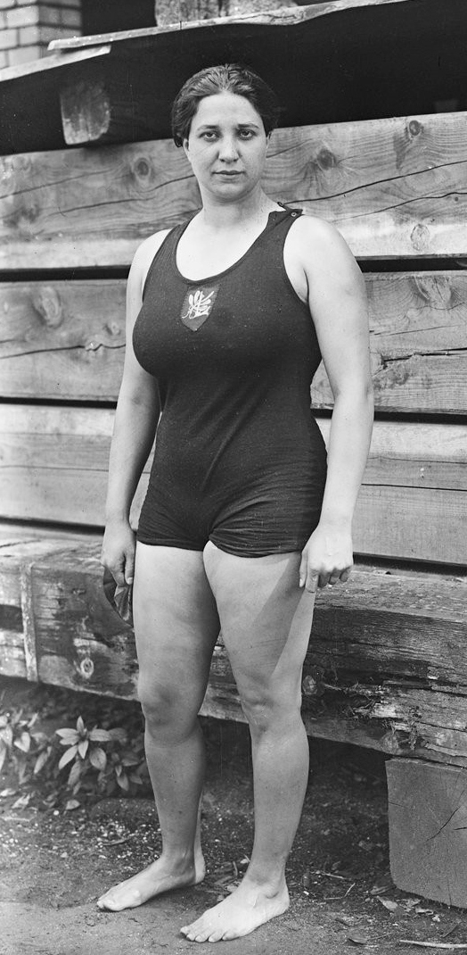 Mme [Violette] Gouraud-Morris [nageuse, 1er août 1920, Bassin Niclausse à Paris, La Villette] : [photographie de presse] / [Agence Rol]